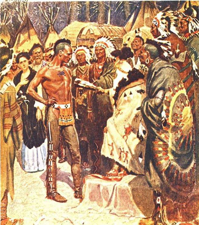 Omslag til Den siste mohikaner, 1939.